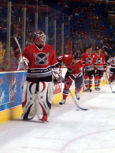 Martin Biron, Buffalo Sabres, hockey goaltender